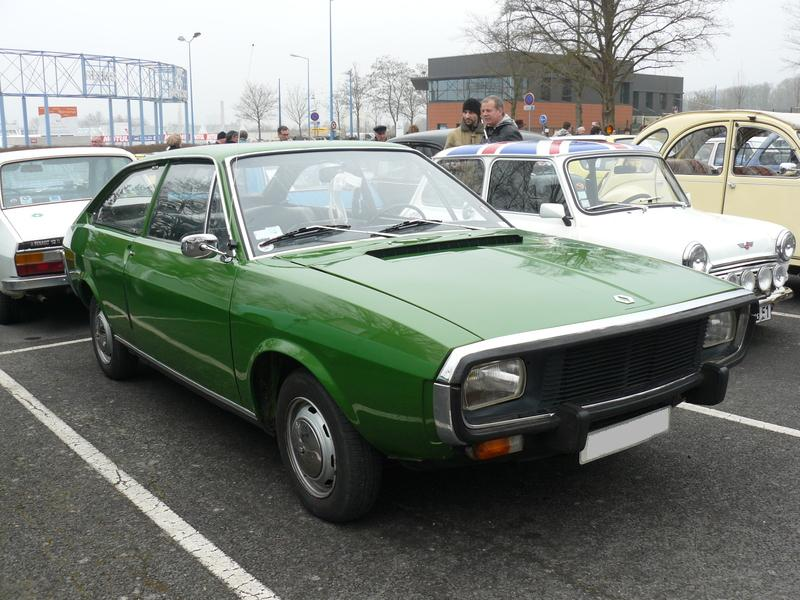 Reims 2012